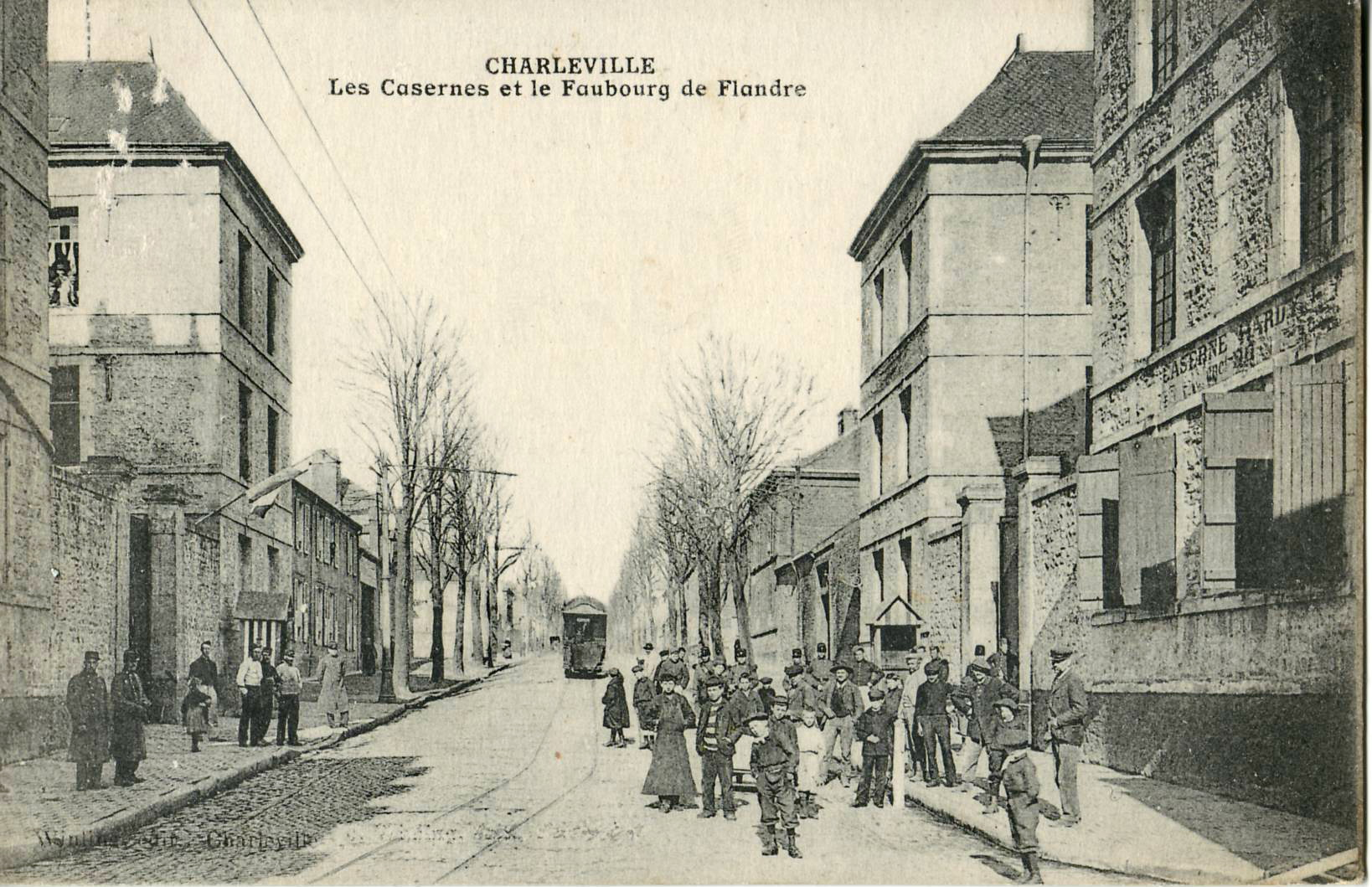 Carte postale ancienne éditée par Winling à Charleville : CHARLEVILLE - Les Casernes et le Faubourg de Flandre .